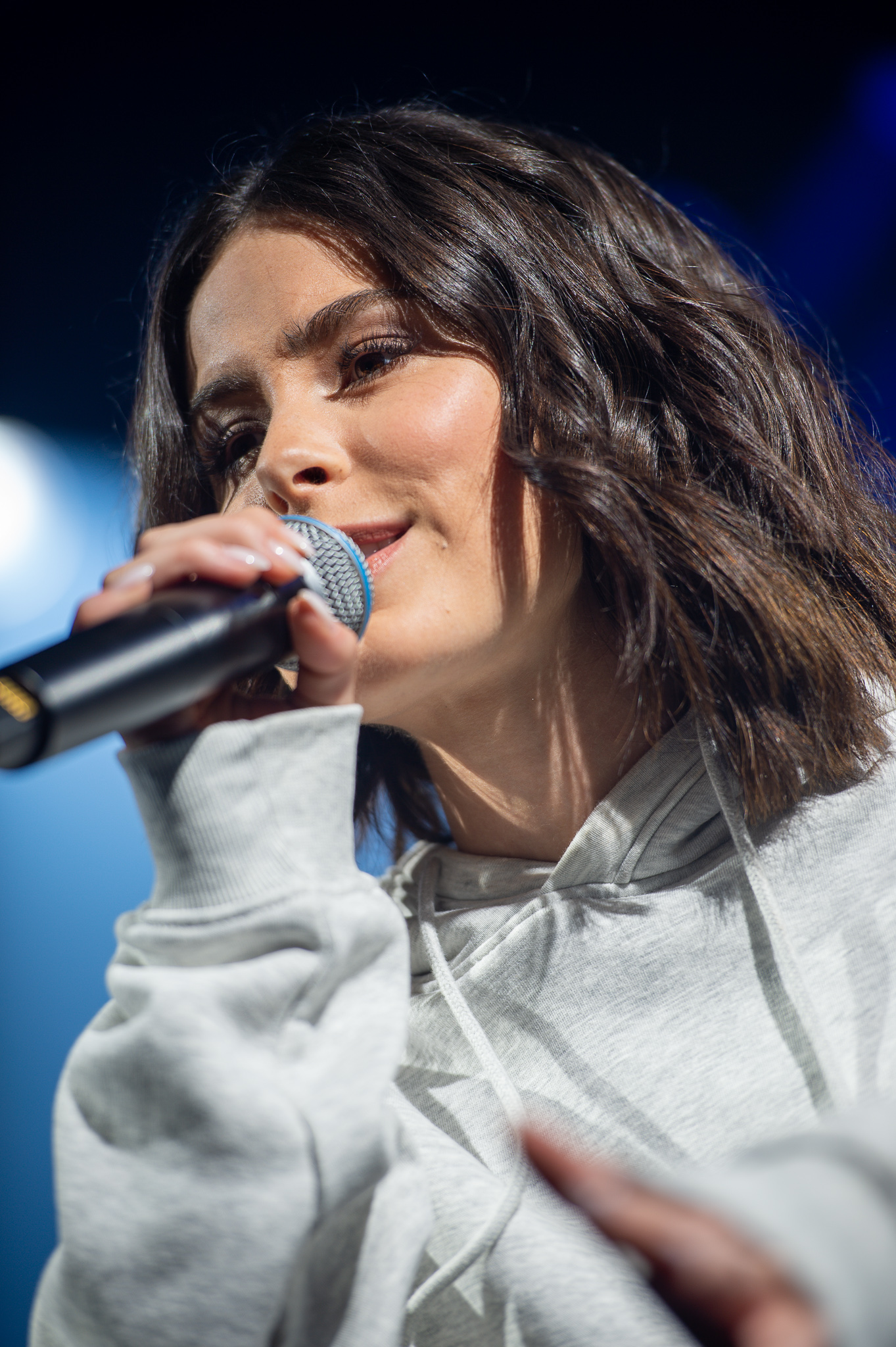 ARGO-Konzerte,Konzert,Lena Meyer-Landrut,Livekonzert,Livemusik,Löwensaal,Only Love Tour 2019